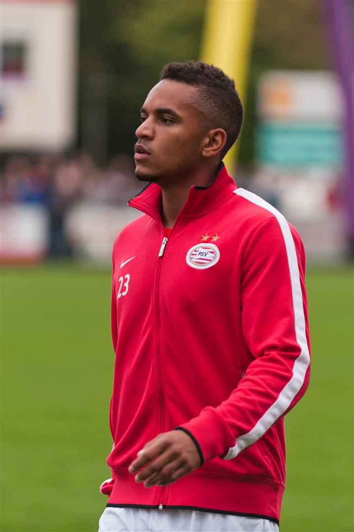 Funso Ojo playing for PSV Eindhoven.